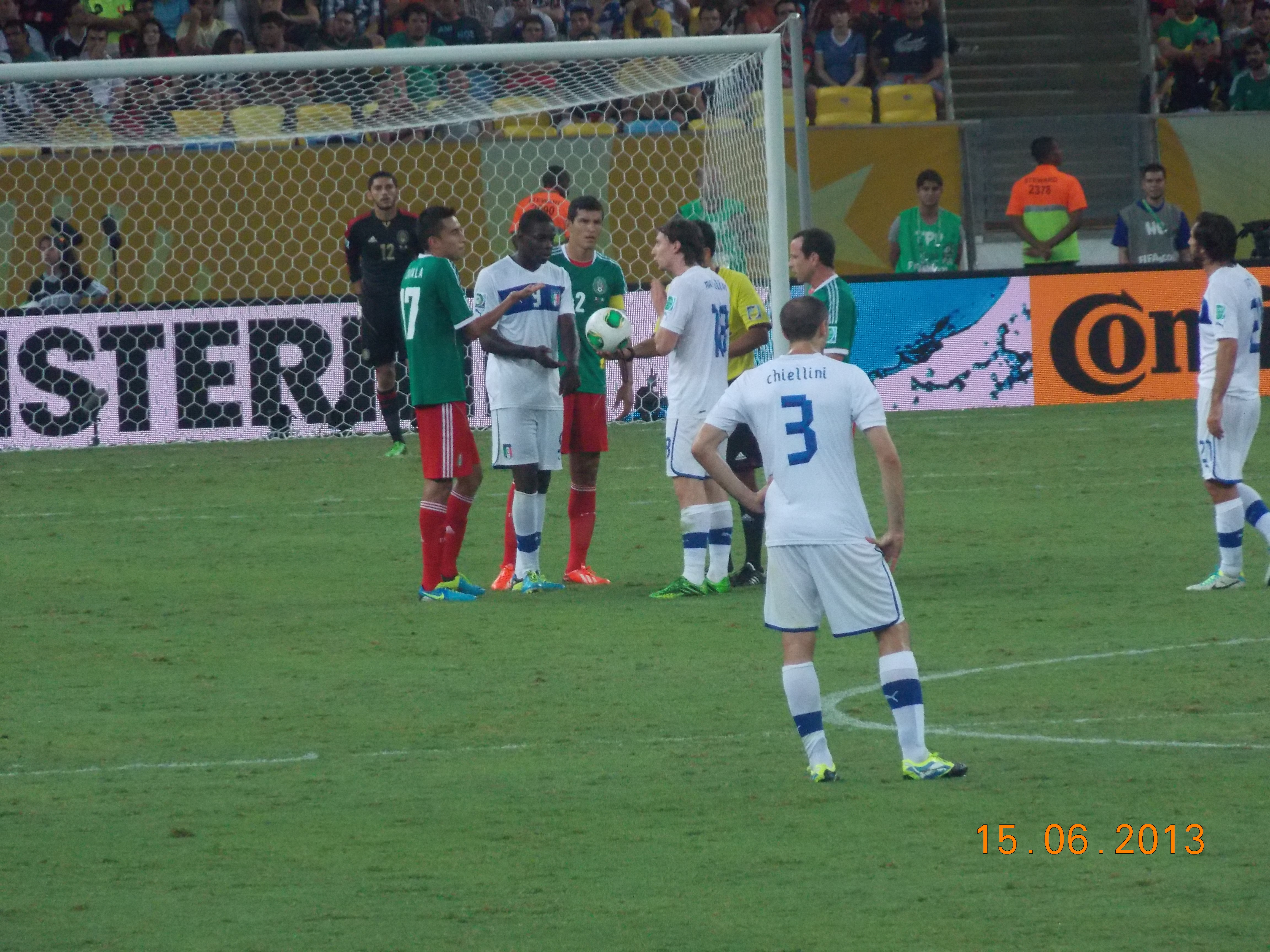 Confederations Cup 2013, Maracanã Stadium, Mexico 1 x 2 Italy.